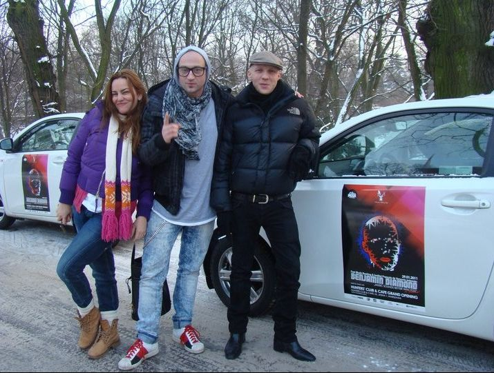 Tigermaan i Benjamin na tle aut Toyota IQ opatrzonych grafiką z plakatem promującym wydarzenie, które zorganizował w Warszawie w klubie Hunter's. Od lewej: Stefania Baranowska, Martin Tigermaan i Benjamin Diamond.